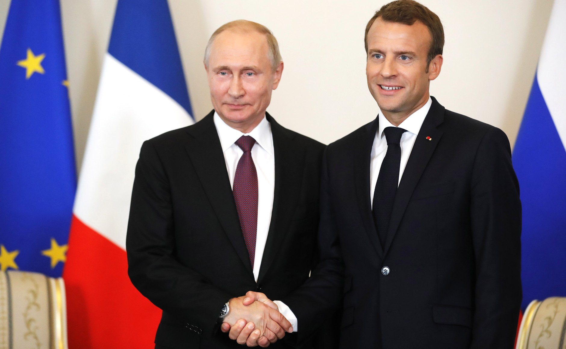 Президент России Владимир Путин с Президентом Франции Эммануэлем Макроном в Санкт-Петербурге 24 мая 2018 года